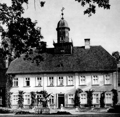 Дворец конезавода Тракенен